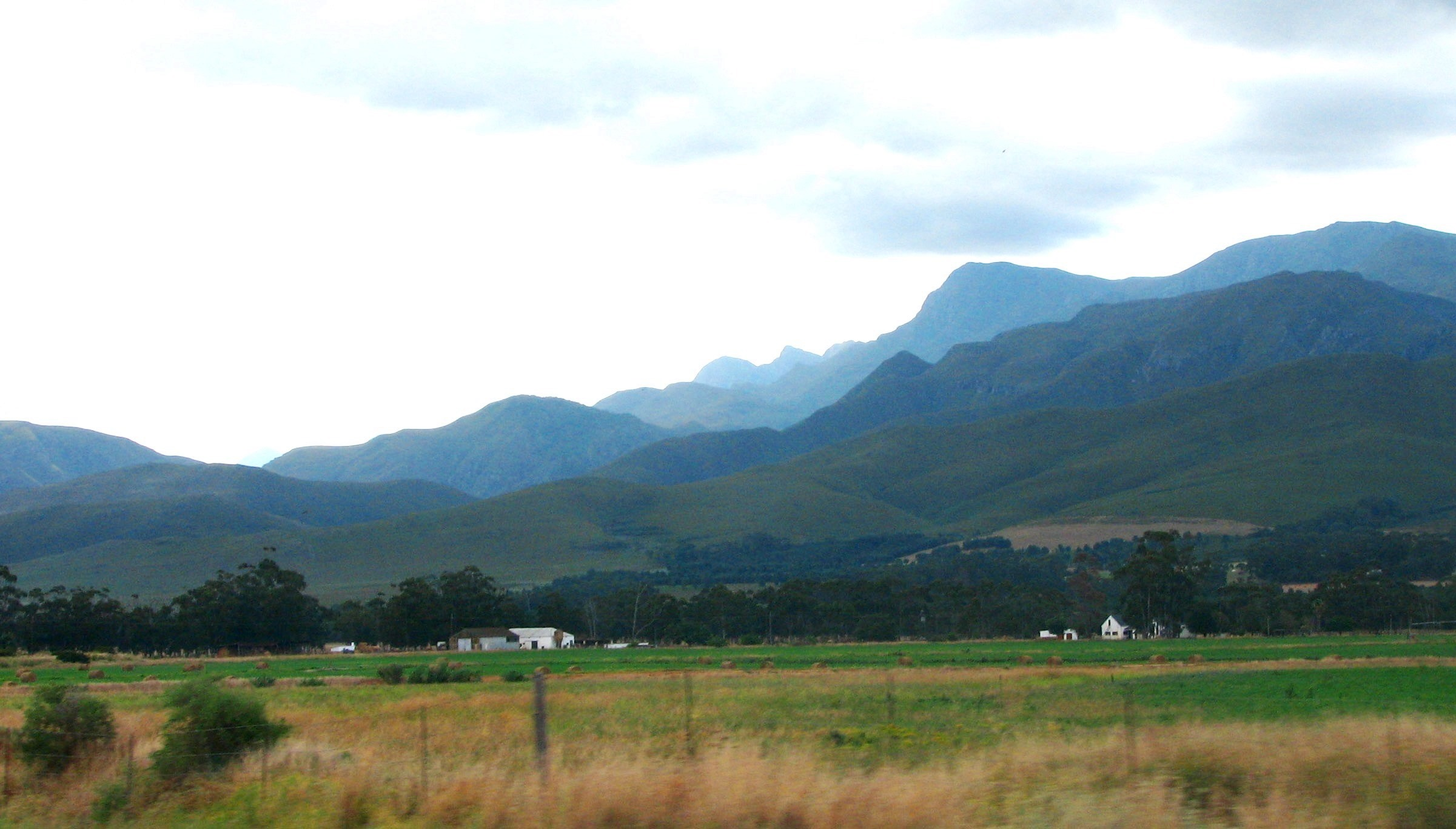 Riviersonderend Mountains, 23 December 2006